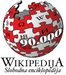 Prijedlog svečarskog logotipa Wikipedije na hrvatskom jeziku povodom 90.000-itog članka